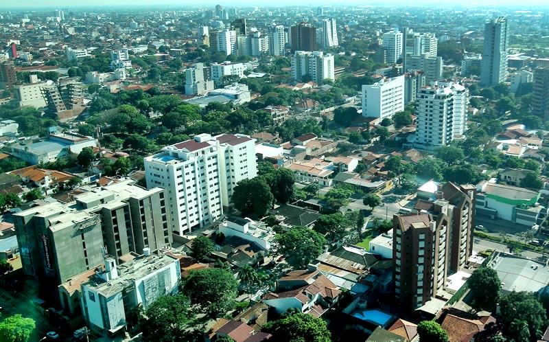 edificios del sur